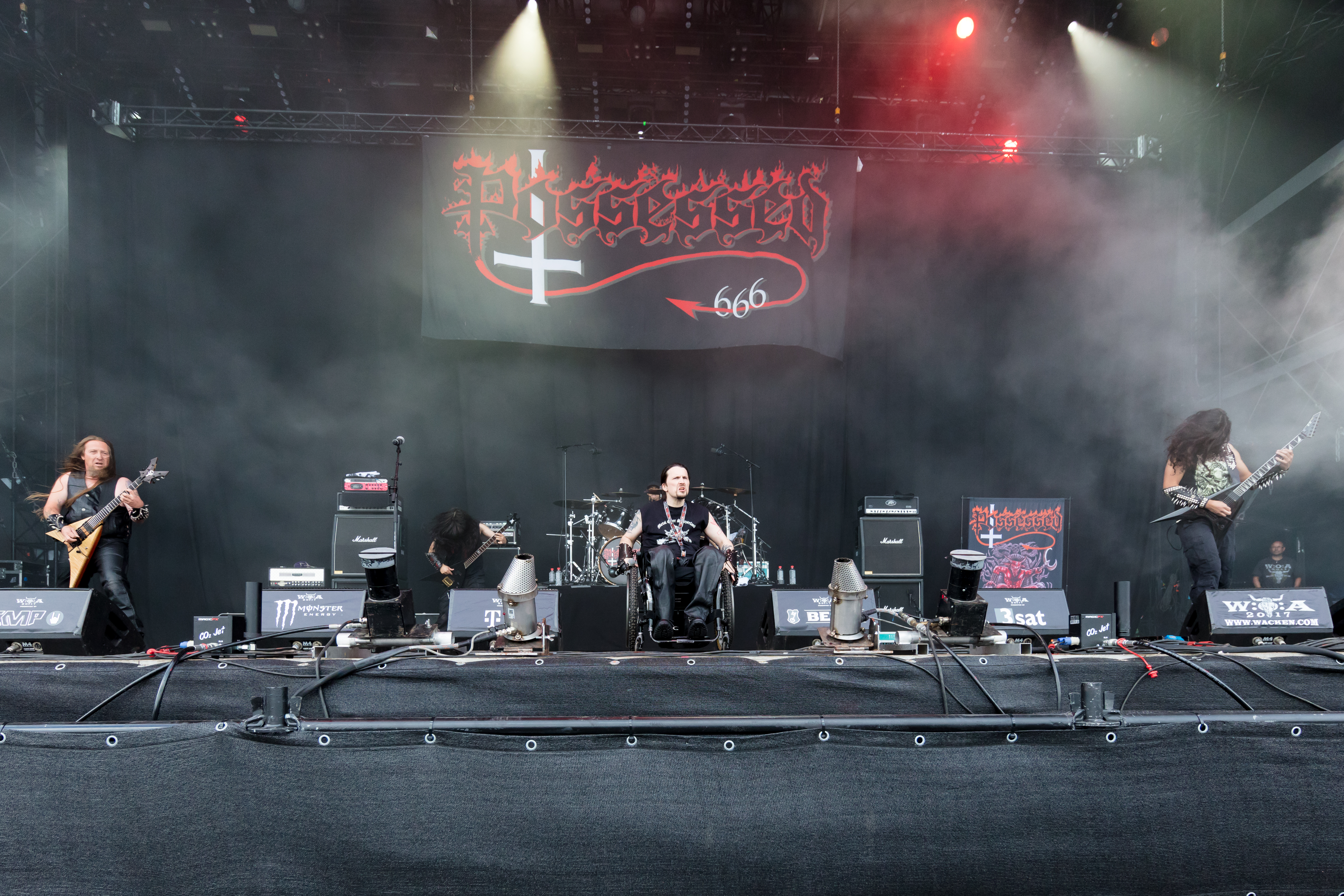 Possessed during Wacken Open Air at Schleswig-Holstein, Wacken, , Germany on 2017-08-05, Photo: Sven Mandel